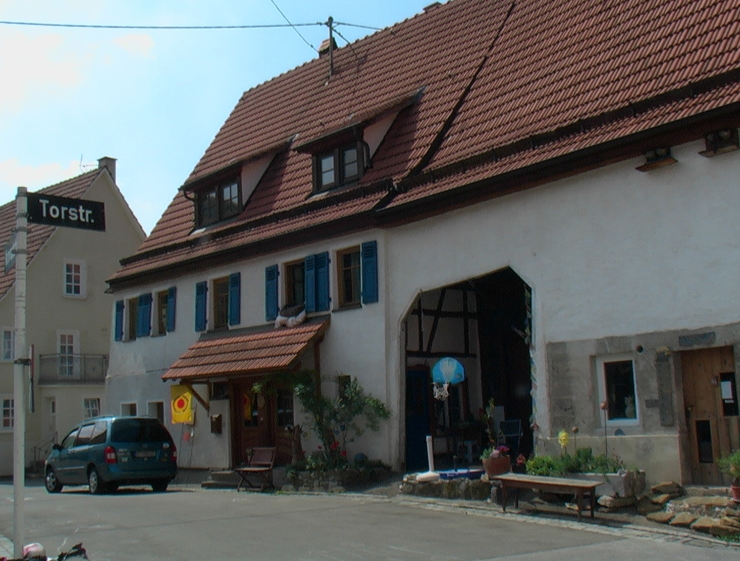 Nordostansicht der ehemaligen Weinstube, auch Käshaus genannt. Das Gebäude steht in der Konradstr. 2 in Gönningen. Erbaut wurde es im 15. Jahrhundert, der Kern ist noch erhalten. Das Obergeschoß wurde später als Weinstube und Samenhandlung genutzt. Der Name Käshaus entspringt dem Umstand, dass die im Haus ansässigen Samenhändler von ihren Handelsreisen Käse mitbrachten und in der Weinstube auch zum Kauf anboten. Rechts das Gebäude Konradstr. 4, um 1835 erbaut mit der typischen Gliederung in Scheune, Stall und Wohnteil.